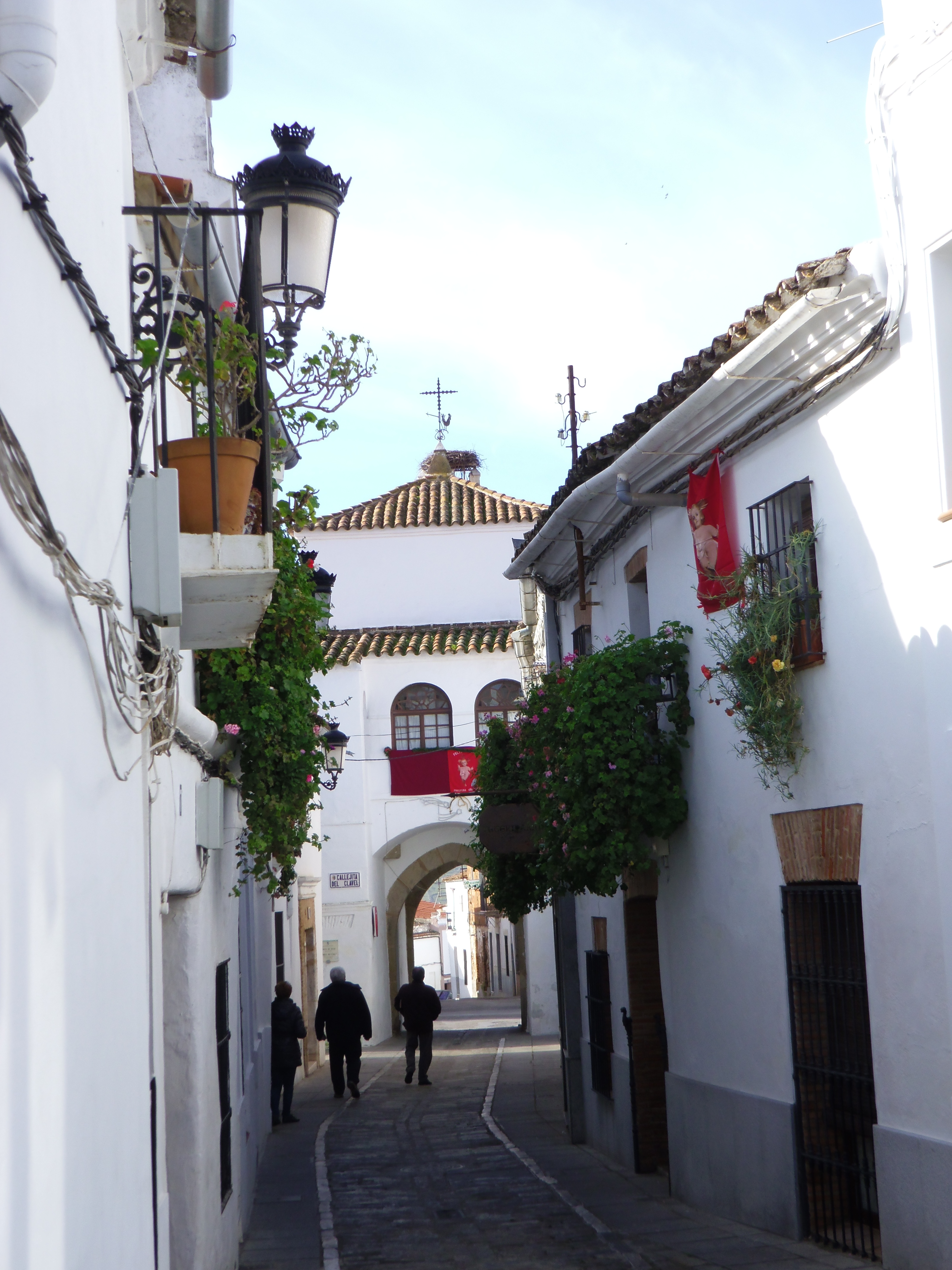 Arco de Jerez. Zafra (provincia de Badajoz). Vista intratramuros